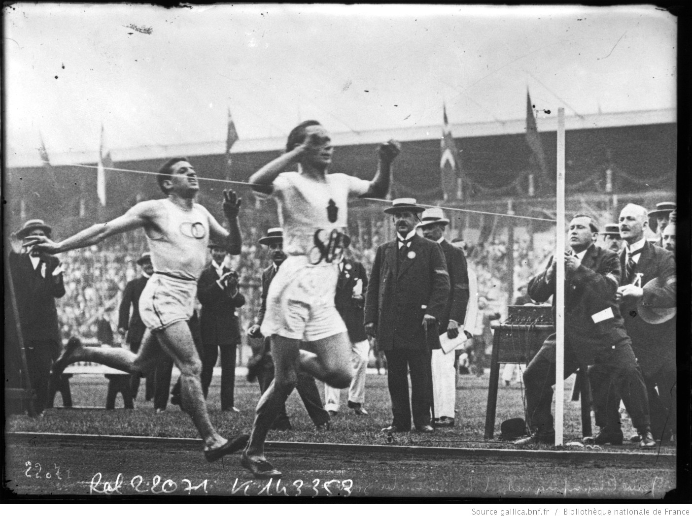 Jeux olympique de Stockholm, arrivée du 5000 mètre [10-7-12, Kolehmainen coiffe Jean Bouin sur le fil] : [photographie de presse] / [Agence Rol]